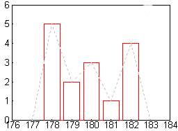 Exemple de diagramme en bâtons avec épaisseur et lissage. Image personnelle créée avec gnuplot et gimp.